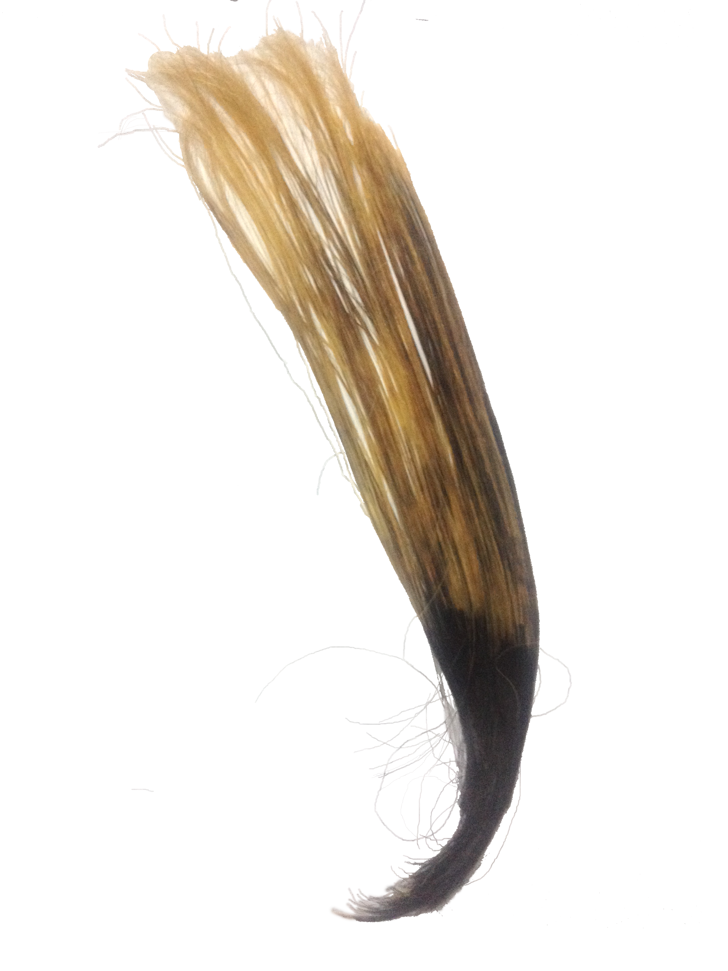 موی انسان که بخشی از آن دکلره شده است.